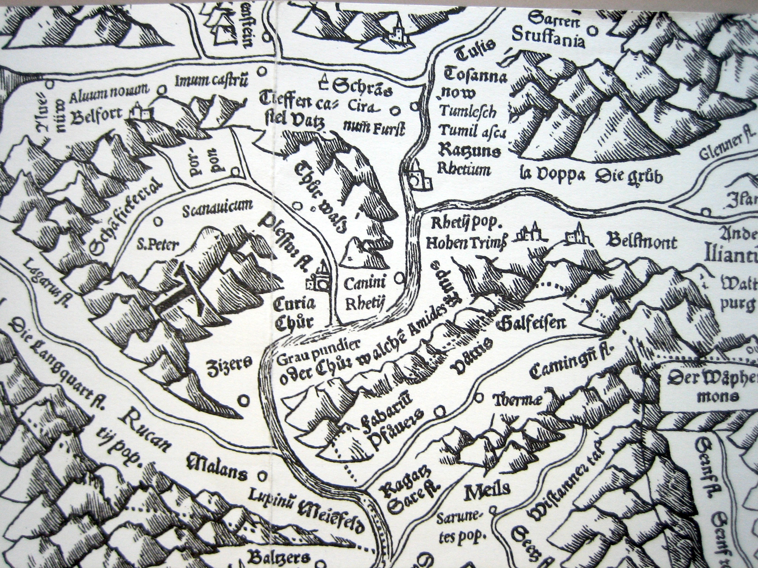 Ausschnitt aus der Schweizerkarte von Aegidius Tschudi, ca. 1560. Der Ausschnitt zeigt das Churer Rheintal, rechts das Vorderrheintal.